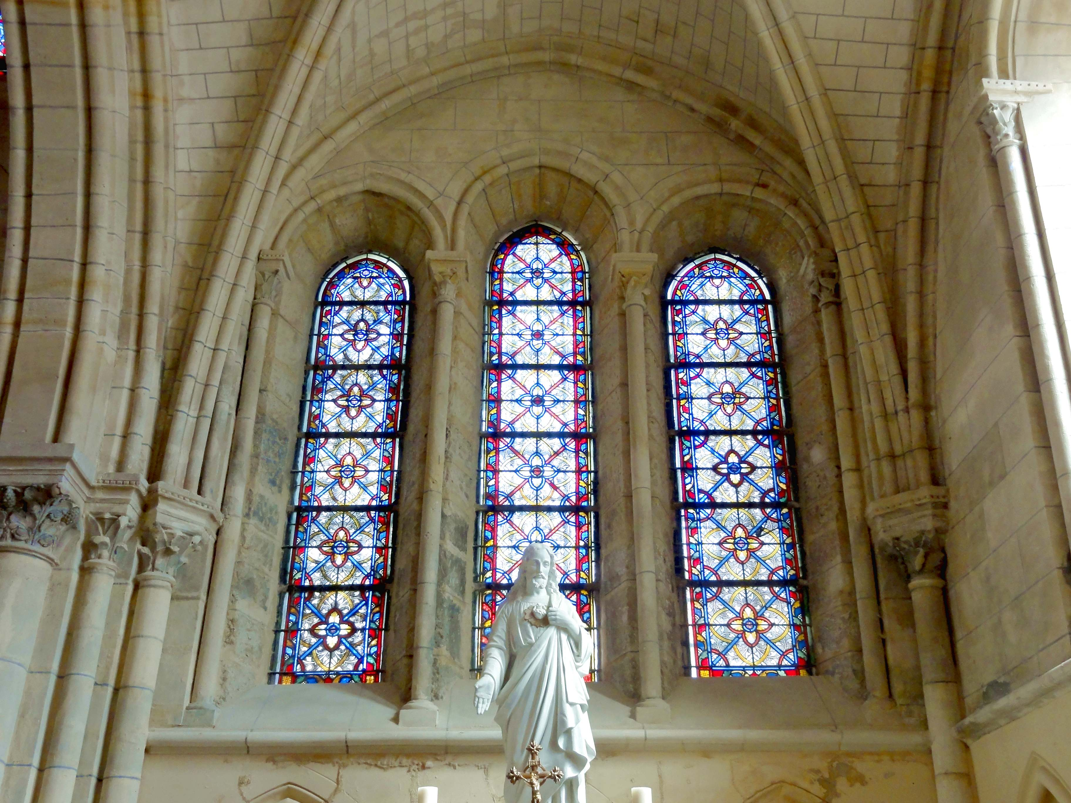 Intérieur de l'église - voir titre.